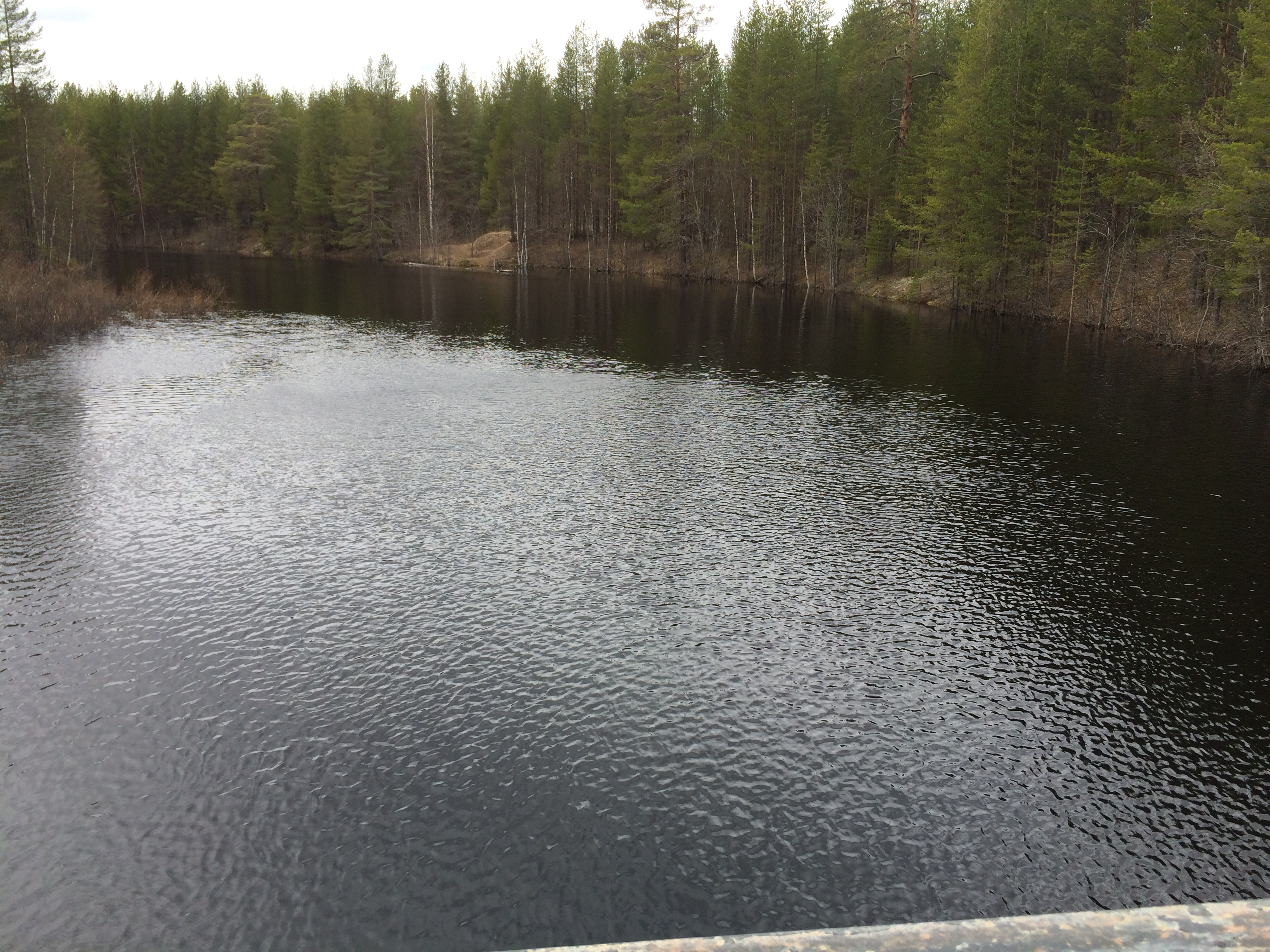 Поннока.